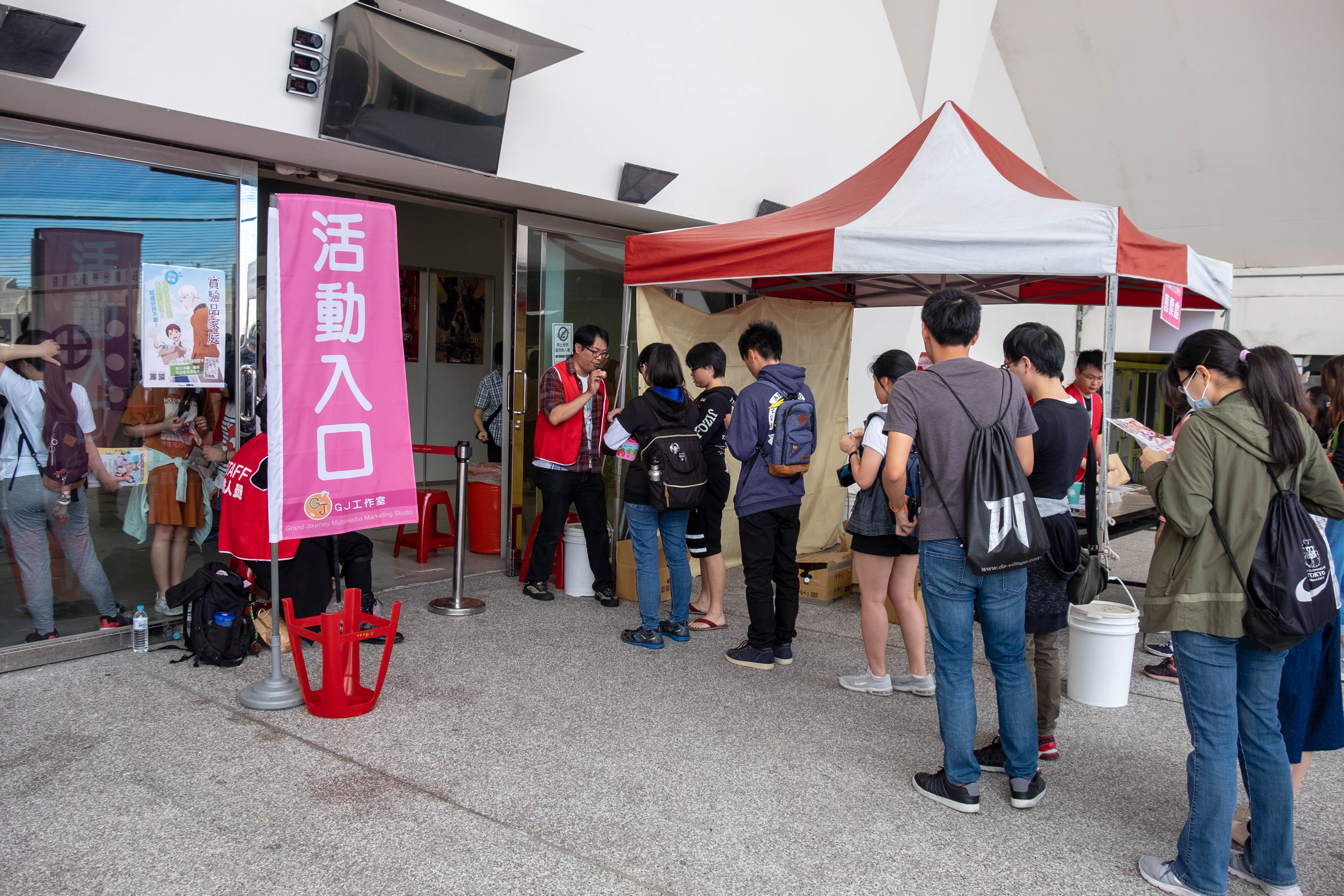 第四屆漫創地平線一般入口，購票後排隊進入會場的隊伍。